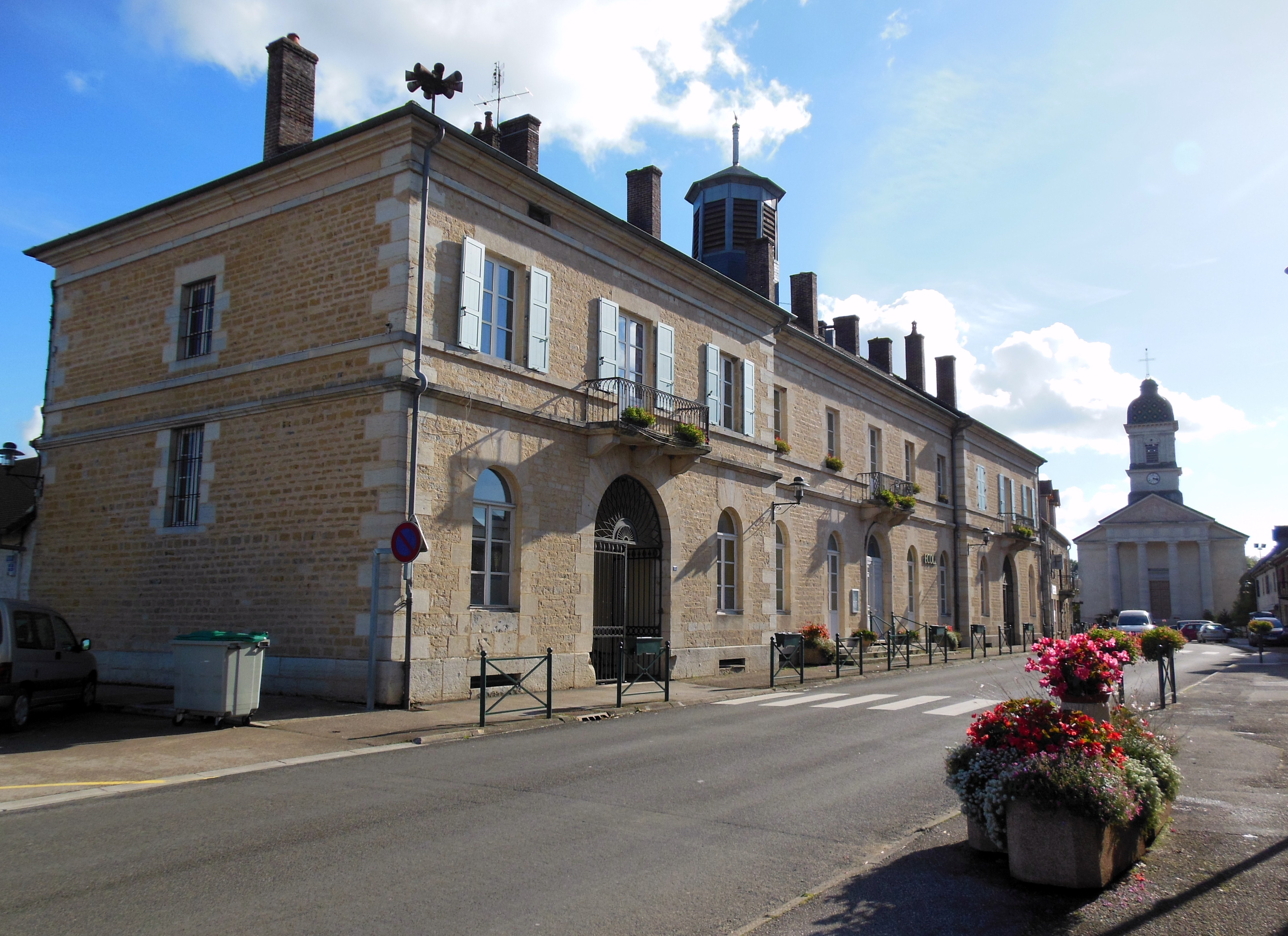 Ancienne mairie-école (XIXe s), aujourd'hui école, sise rue Jules Grévy, à Mont-sous-Vaudrey (Jura).